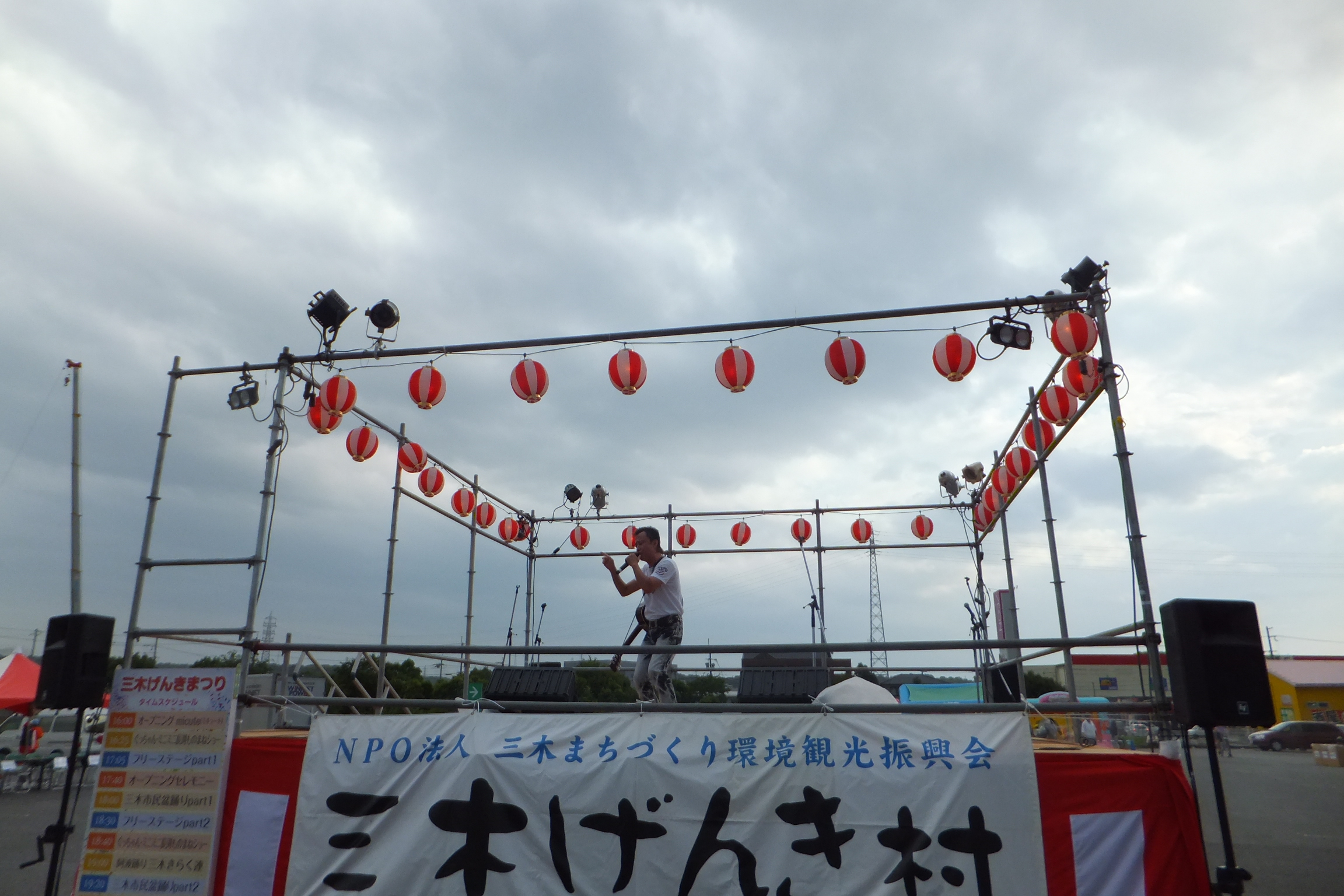 ミニミニ長渕（2013年8月31日）